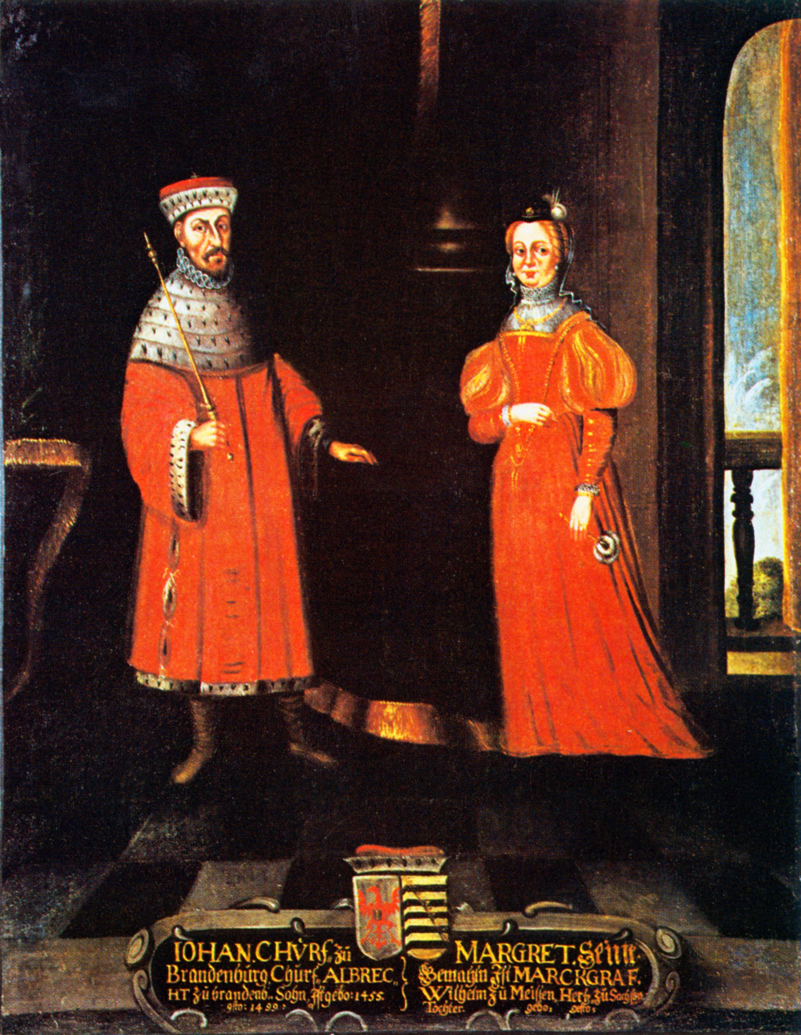 Johann Cicero, Kurfurst von Brandenburg (1455-1499), und seine Gemahlin Margarete, Herzogin von Sachsen (1449-1535)